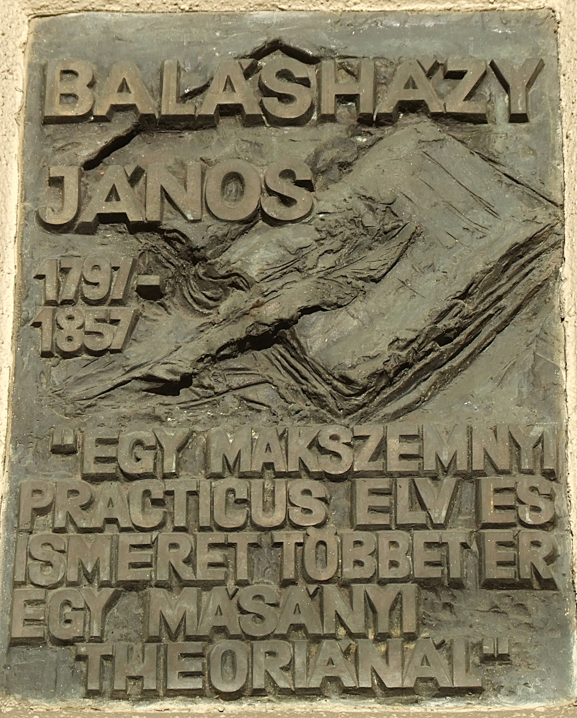 Balasházy János emléktáblája Kossuth Lajos tér 11